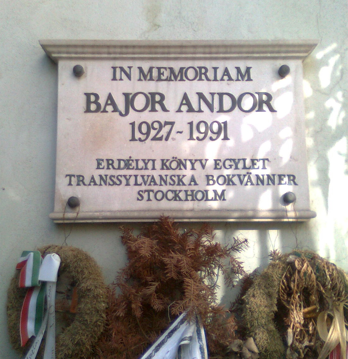 Emléktábla Bajor Andor tiszteletére a kolozsvári katolikus plébánia udvarán, a Keresztény Szó szerkesztősége falán